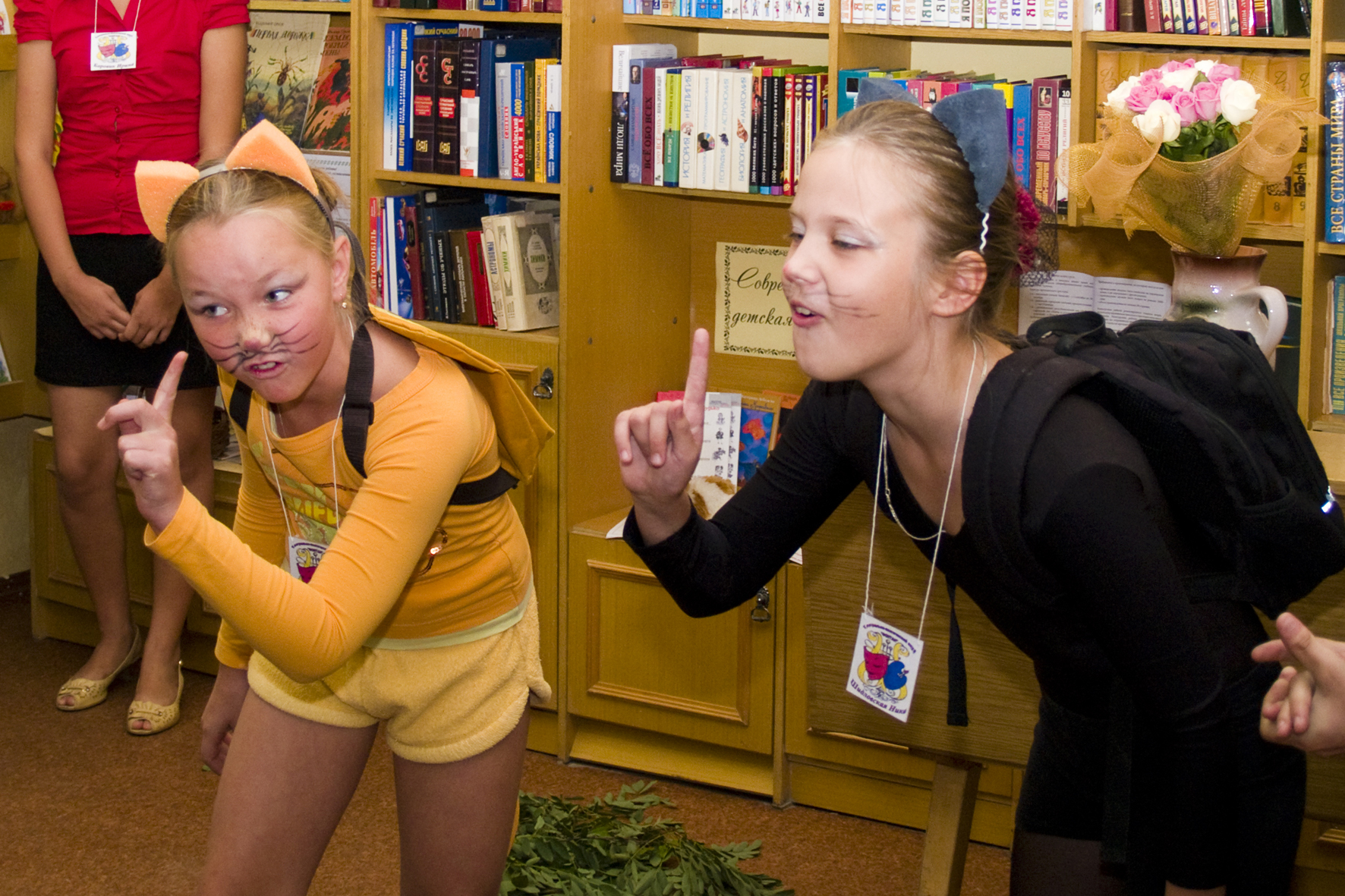 Выступление театрально-поэтического клуба «Фонтан» на Третьих Орловских литературных чтениях